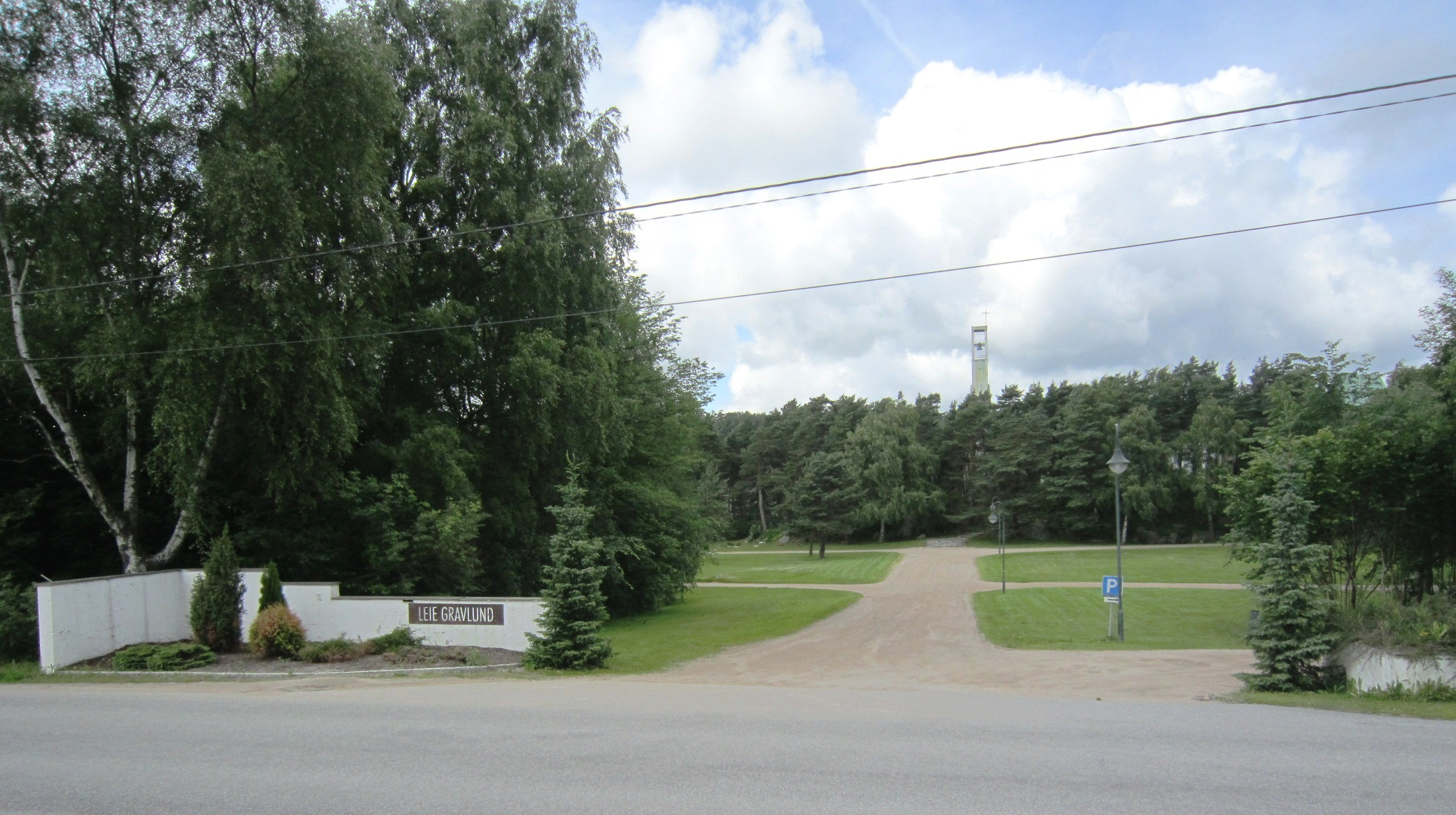 Inngangspartiet ved Leie gravlund i Fredrikstad